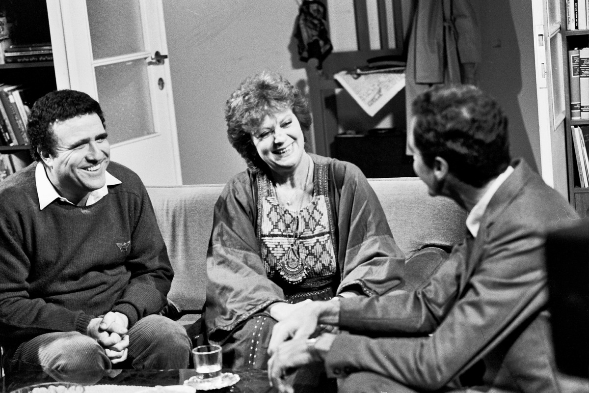 צוות תוכנית הטלוויזיה קרובים קרובים של הטלוויזיה הלימודית חנה מרון ויהורם גאון